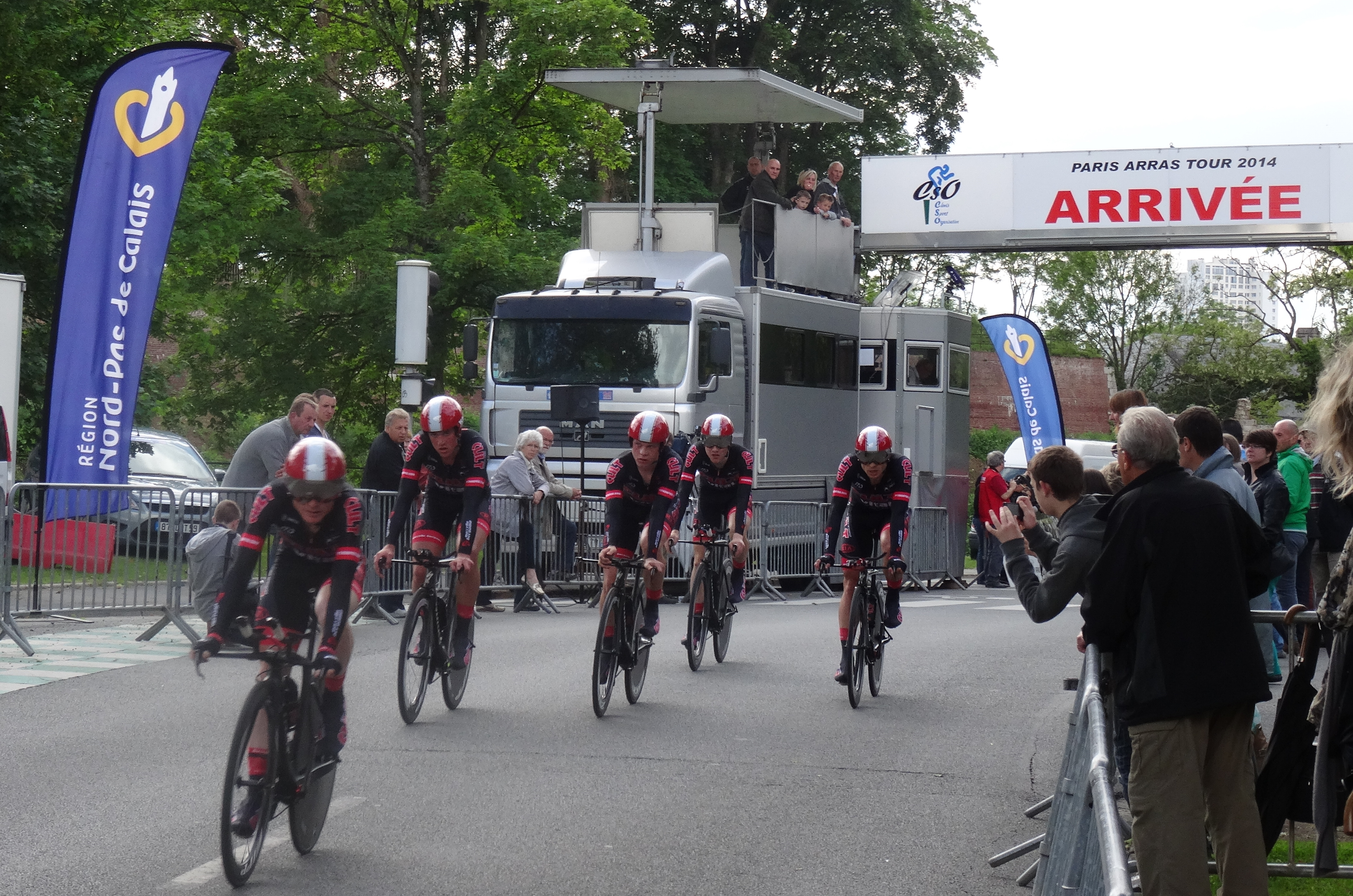 Reportage photographique réalisé le vendredi 23 mai 2014 à l'occasion de l'arrivée de la première étape du Paris-Arras Tour 2014 devant la citadelle d'Arras, Pas-de-Calais, Nord-Pas-de-Calais, France. Depicted team: Cult Energy Vital Water